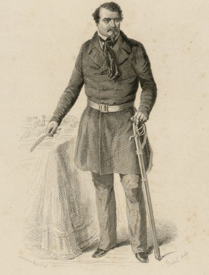 Marc Caussidiere en1848